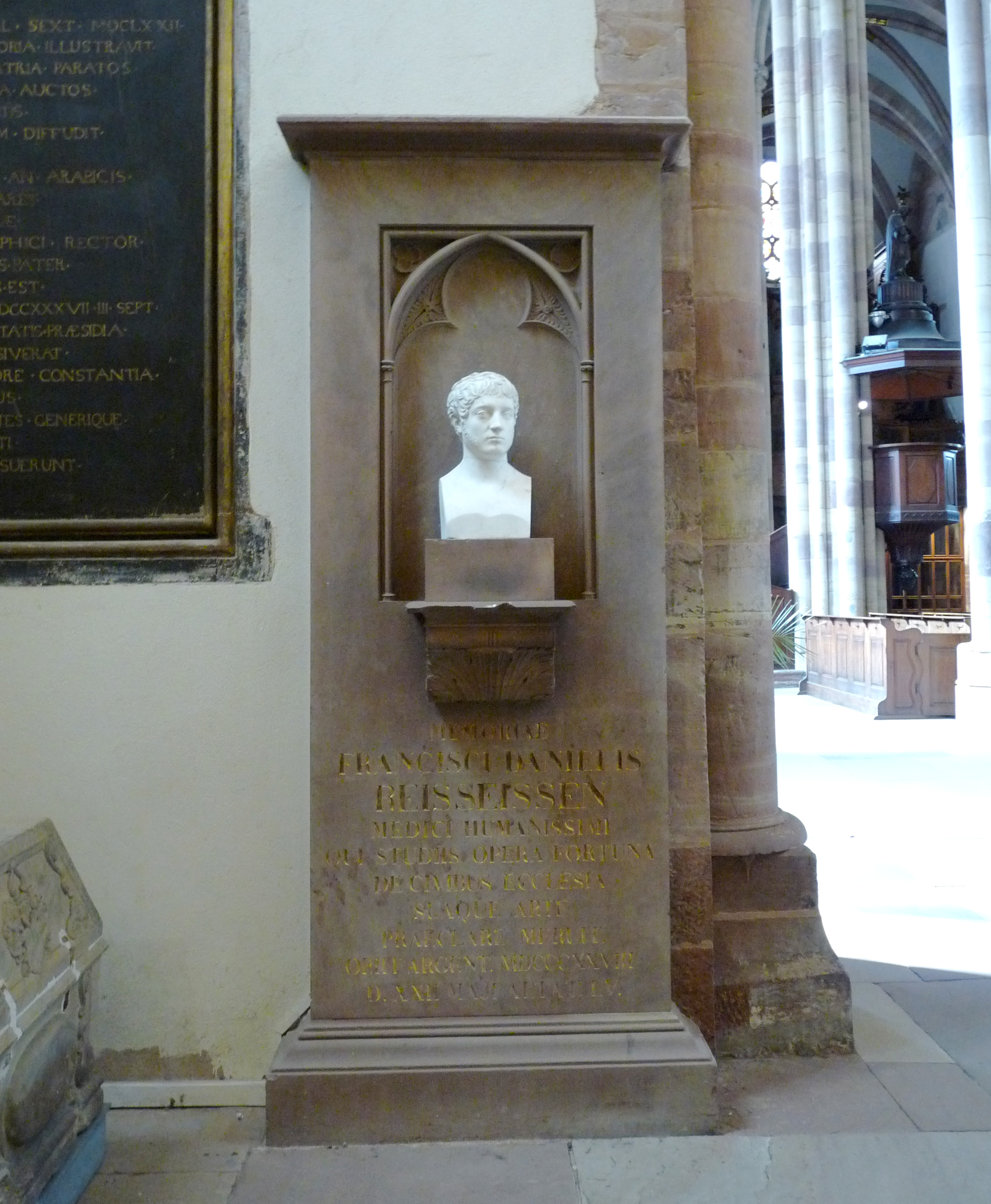 Monument funéraire du médecin François-Daniel Reisseissen à l'église Saint-Thomas de Strasbourg (oeuvre de Landolin Ohmacht)